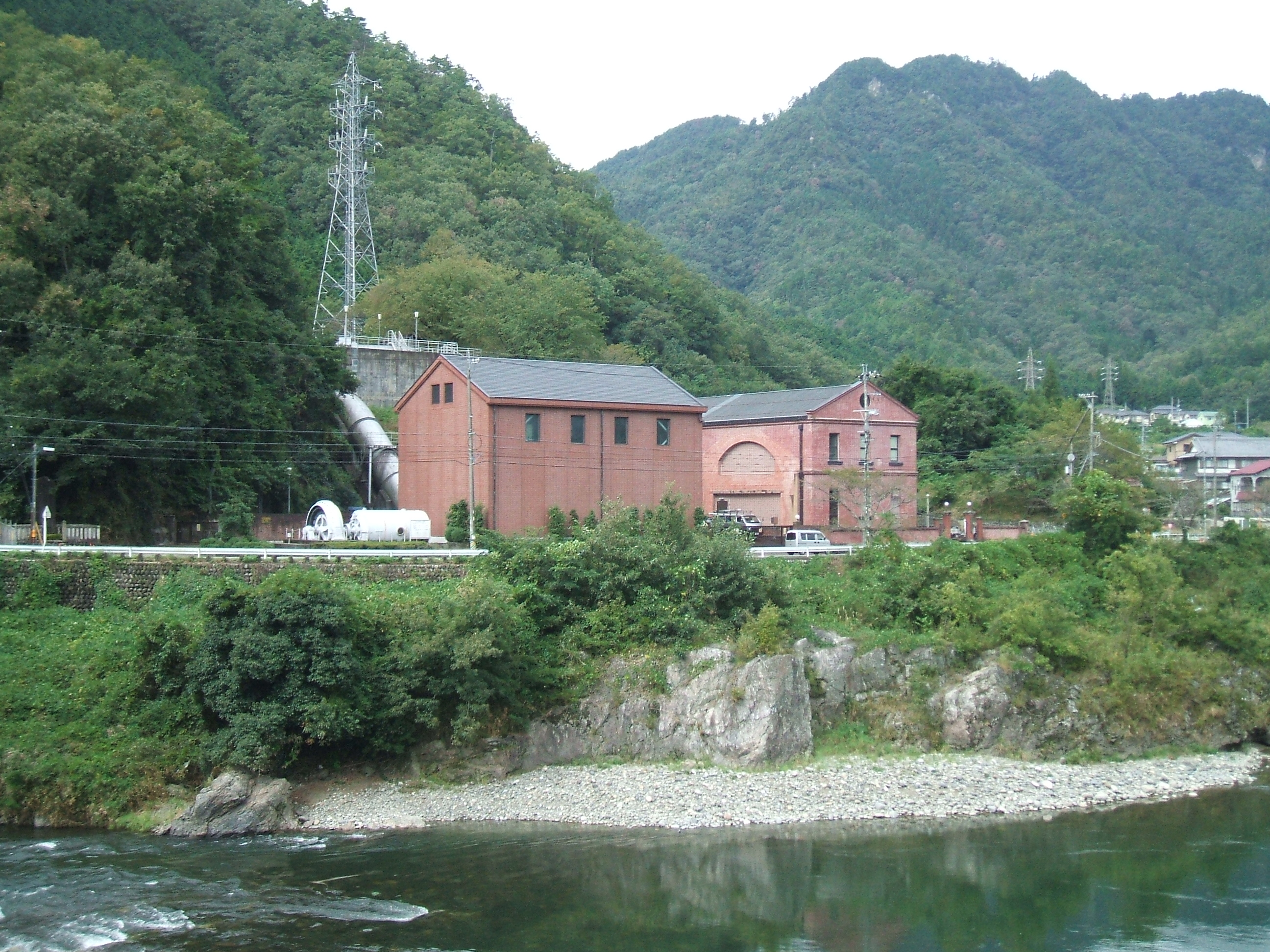 立花橋から見た発電所全景。